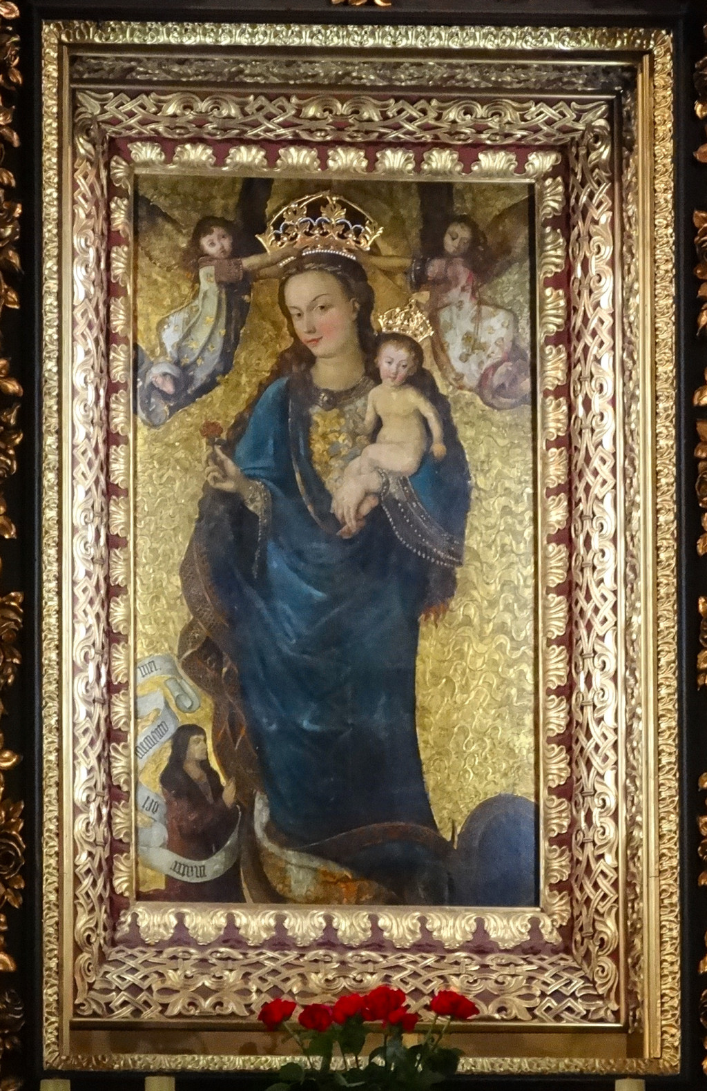 Obraz Matki Bożej Pięknej Miłości w ołtarzu głównym katedry bydgoskiej; "Madonna Bydgoska" (XV w.), dwukrotnie koronowany (1966, 1999)